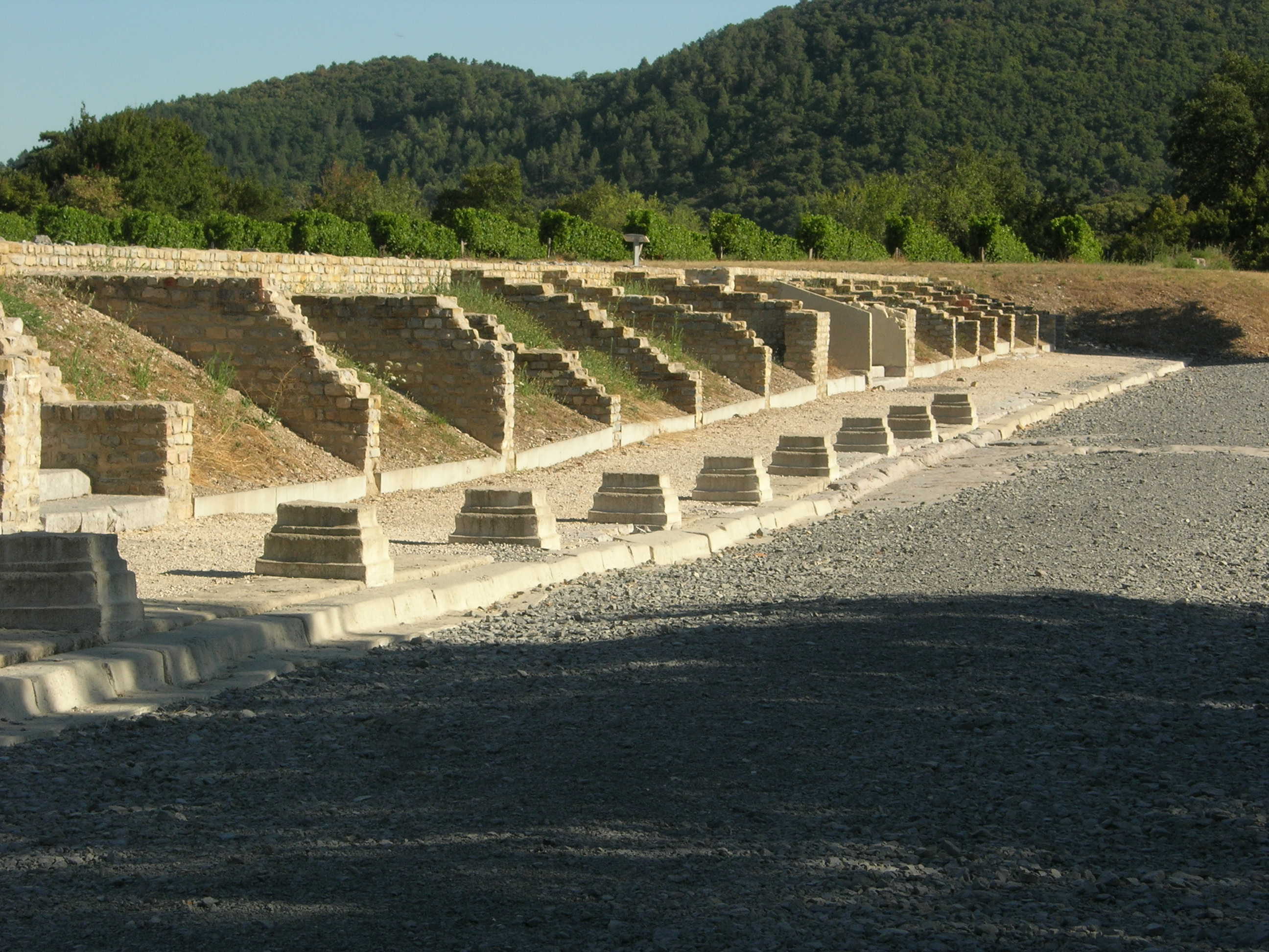 Ruines romaines d'Alba-la-Romaine, Ardèche, France